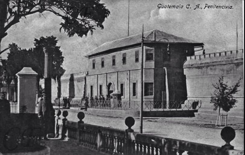 Penitenciaría Central en la década de 1890.